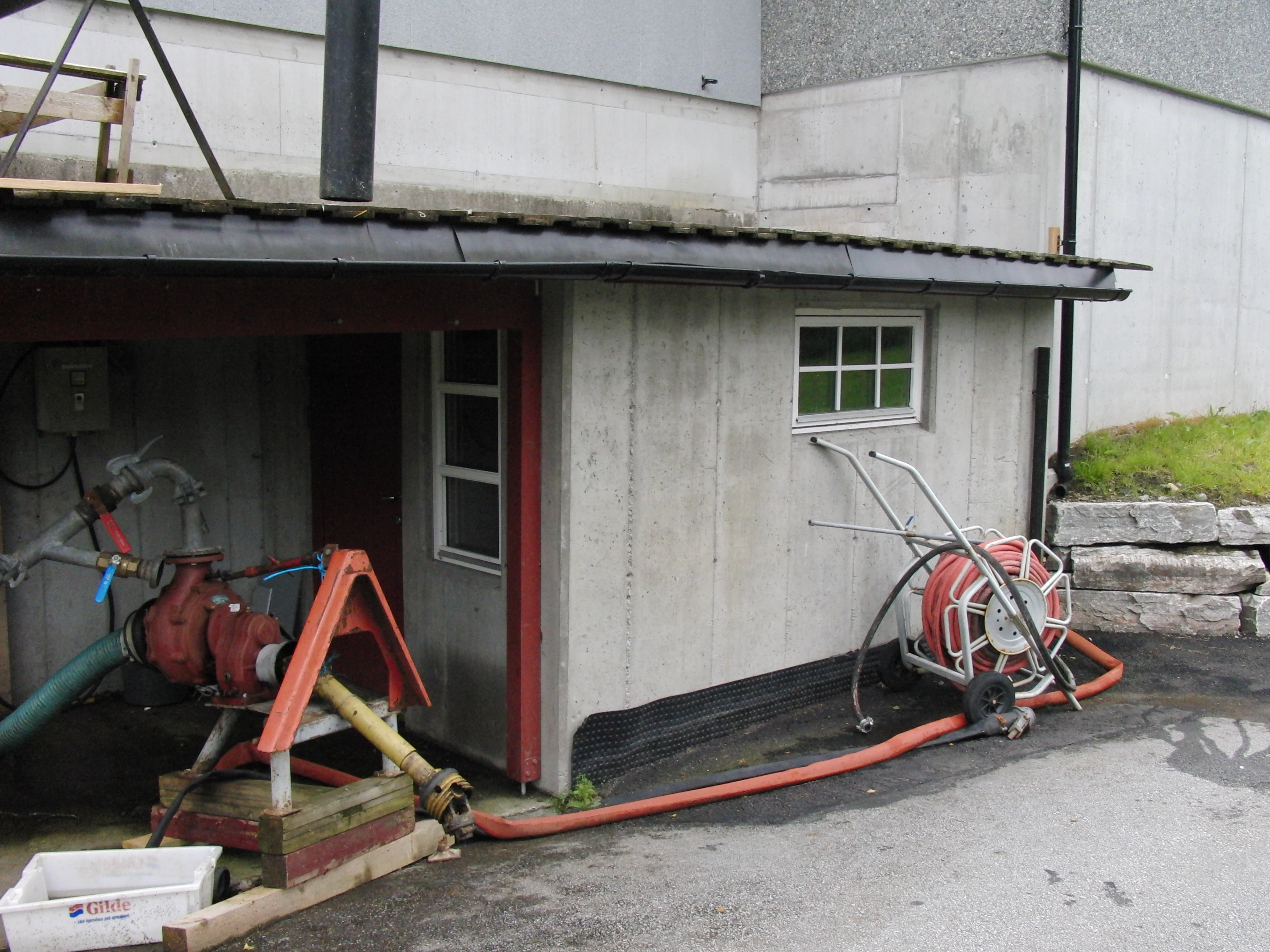 Gjerland mikrokraftverk